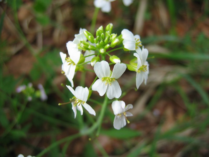 Sand-Schaumkresse Cardaminopsis arenosa subsp. arenosa, Rügen